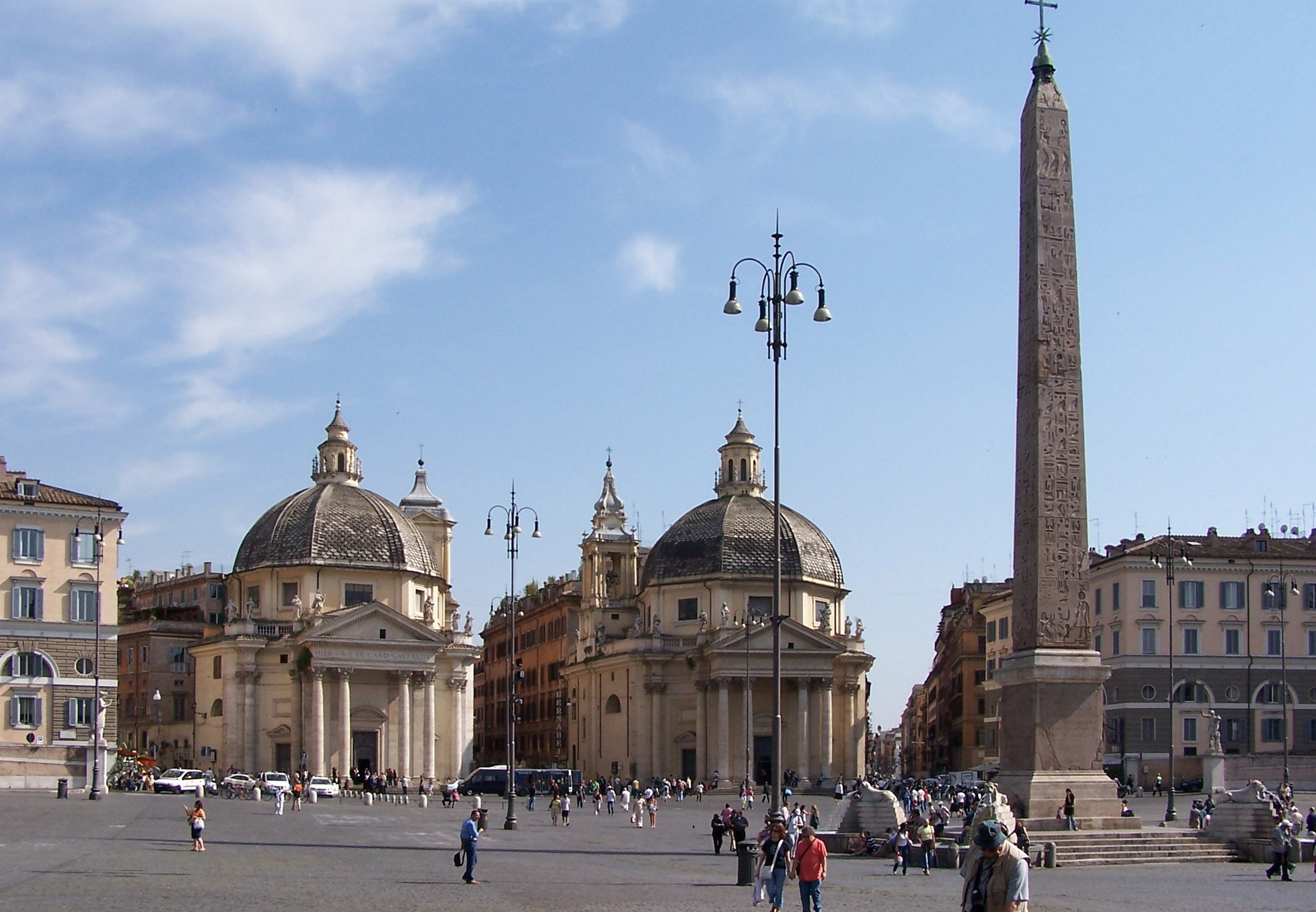 Roma, Piazza del Popolo, Santa Maria di Monte Santo und Santa Maria dei Miracoli